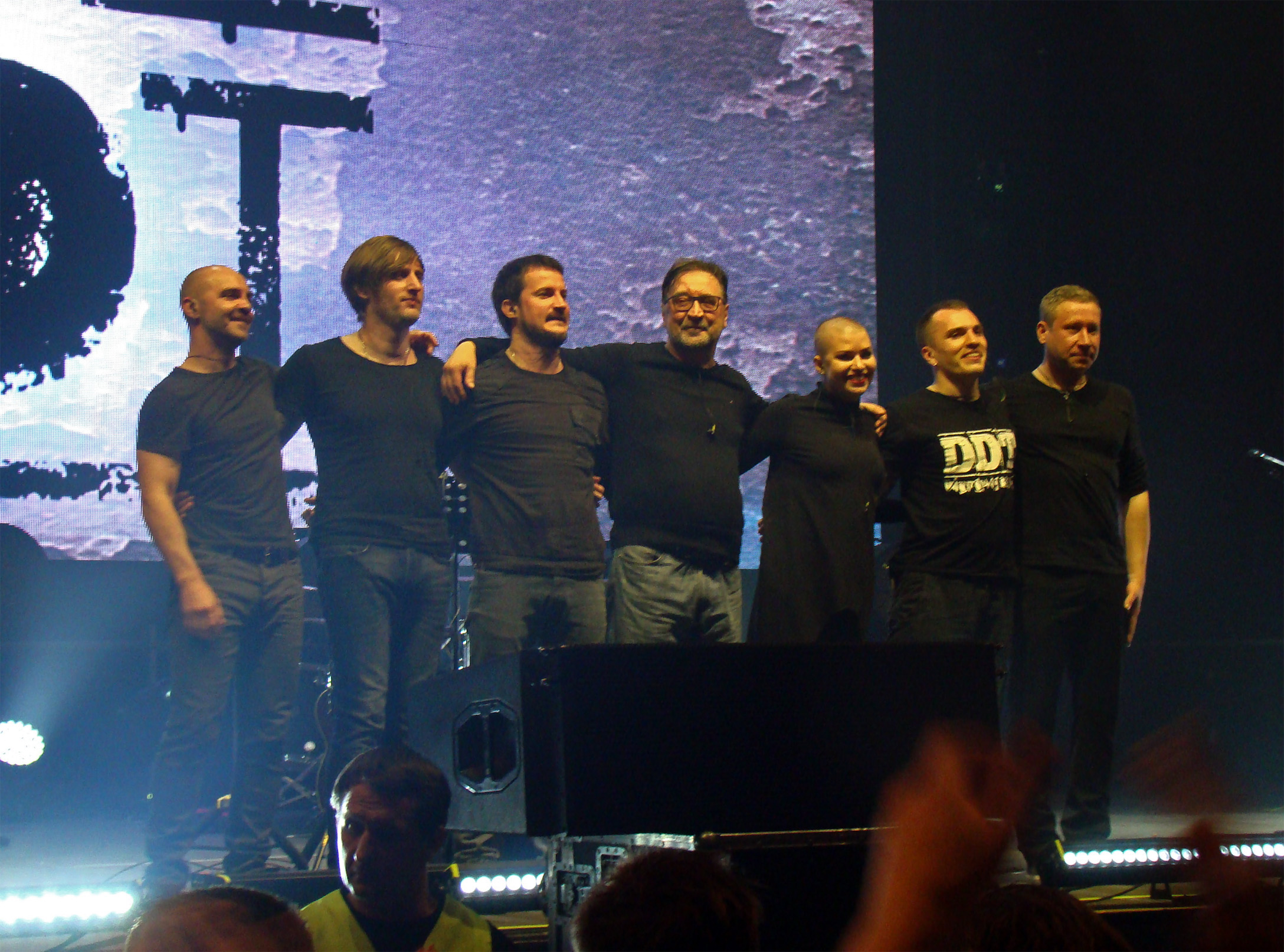 Концерт группы ДДТ в Нижнем Новгороде